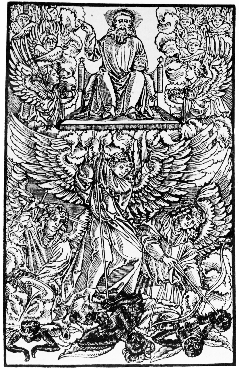 Францыск Скарына. "Тройца" ("Бітва анёлаў з д'ябламі"). Первыя книги Моисеовы рекомыя Бытия (Кніга Быццё). Прага, 1519. Абарот тытульнага аркуша. 157Х105 мм.